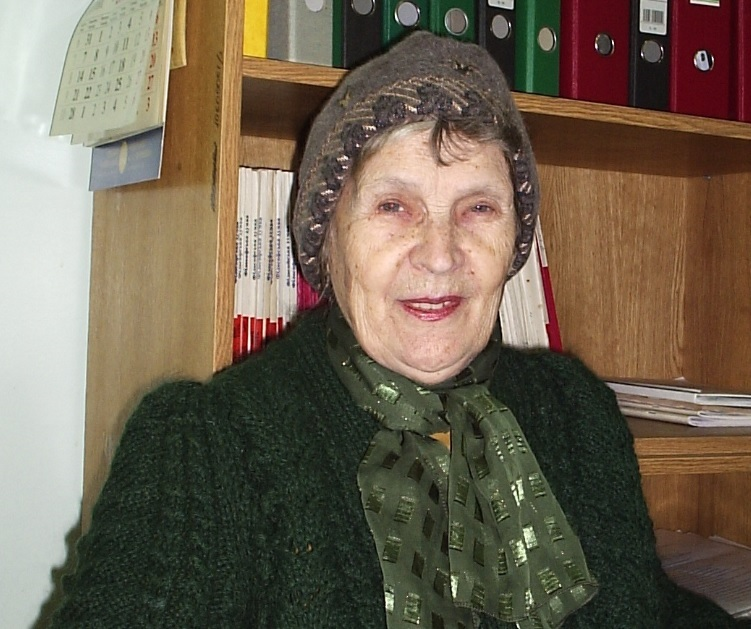 Доктор философских наук, профессор